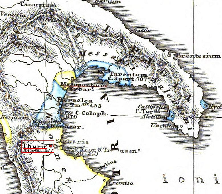 Lage der (antiken) Stadt Thurioi (Thurii) am Golf von Tarent